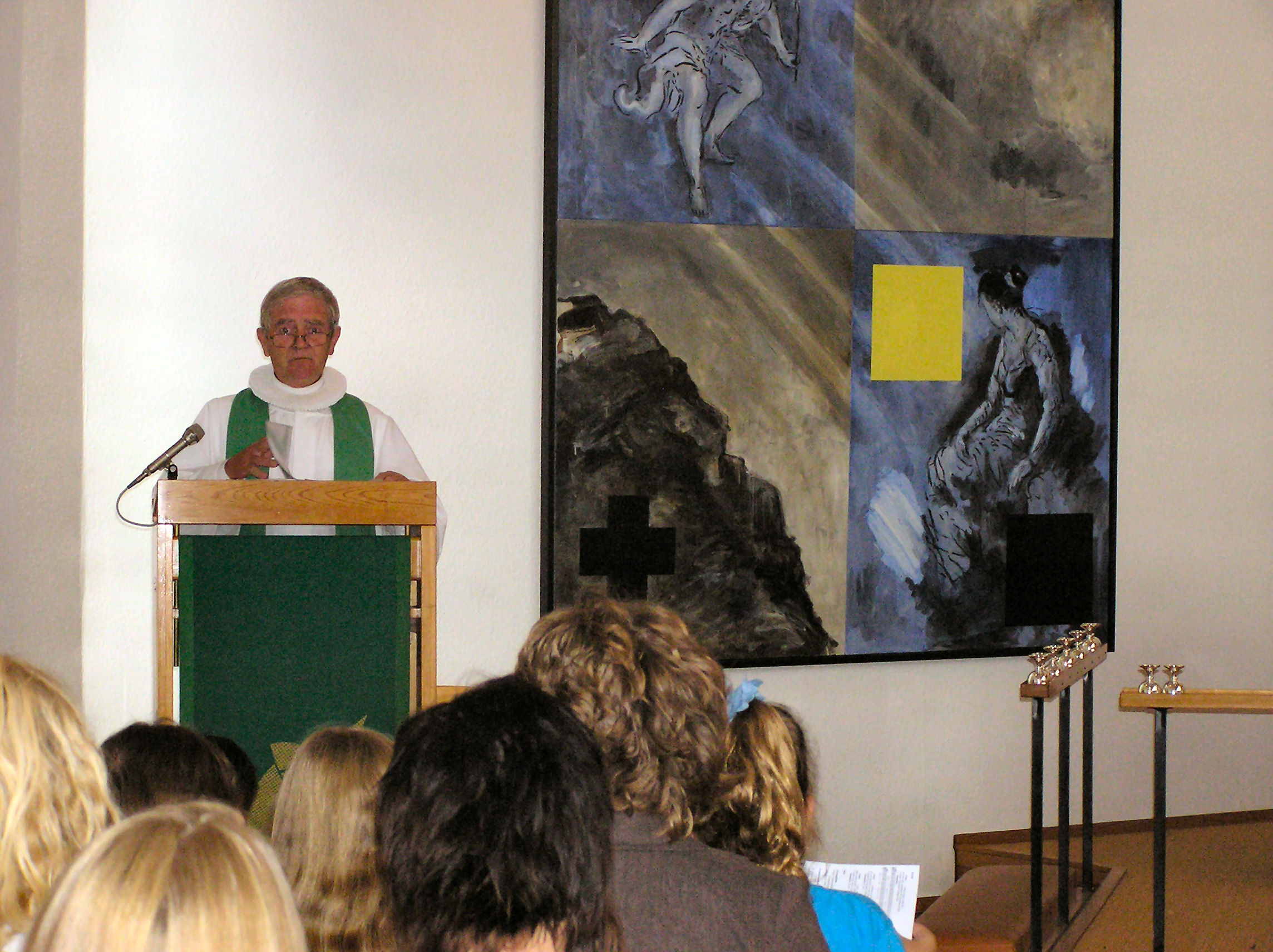 Bavnehøj Kirke, prædiken, sognepræst Frederik Hjerrild